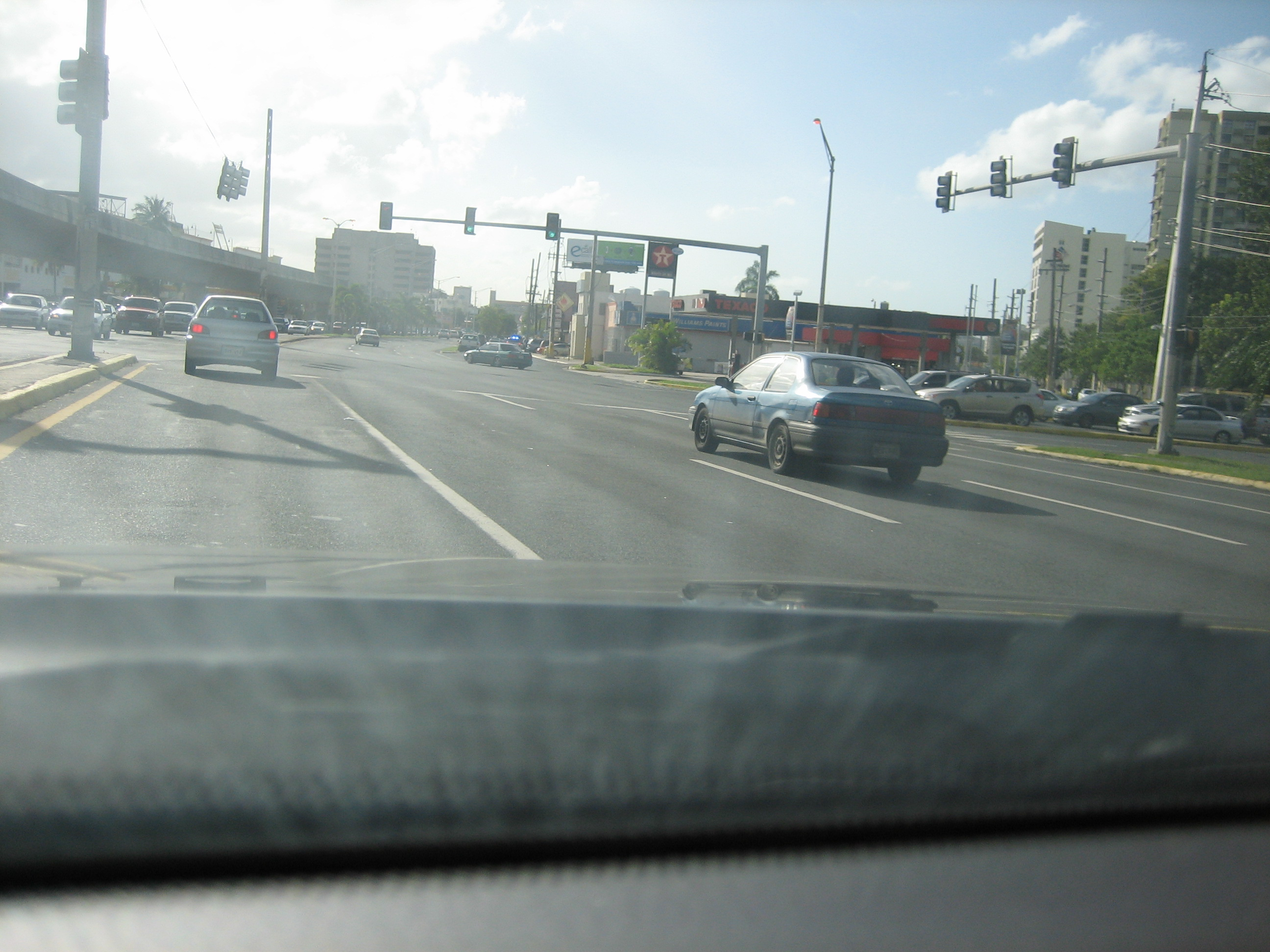 Carretera 2